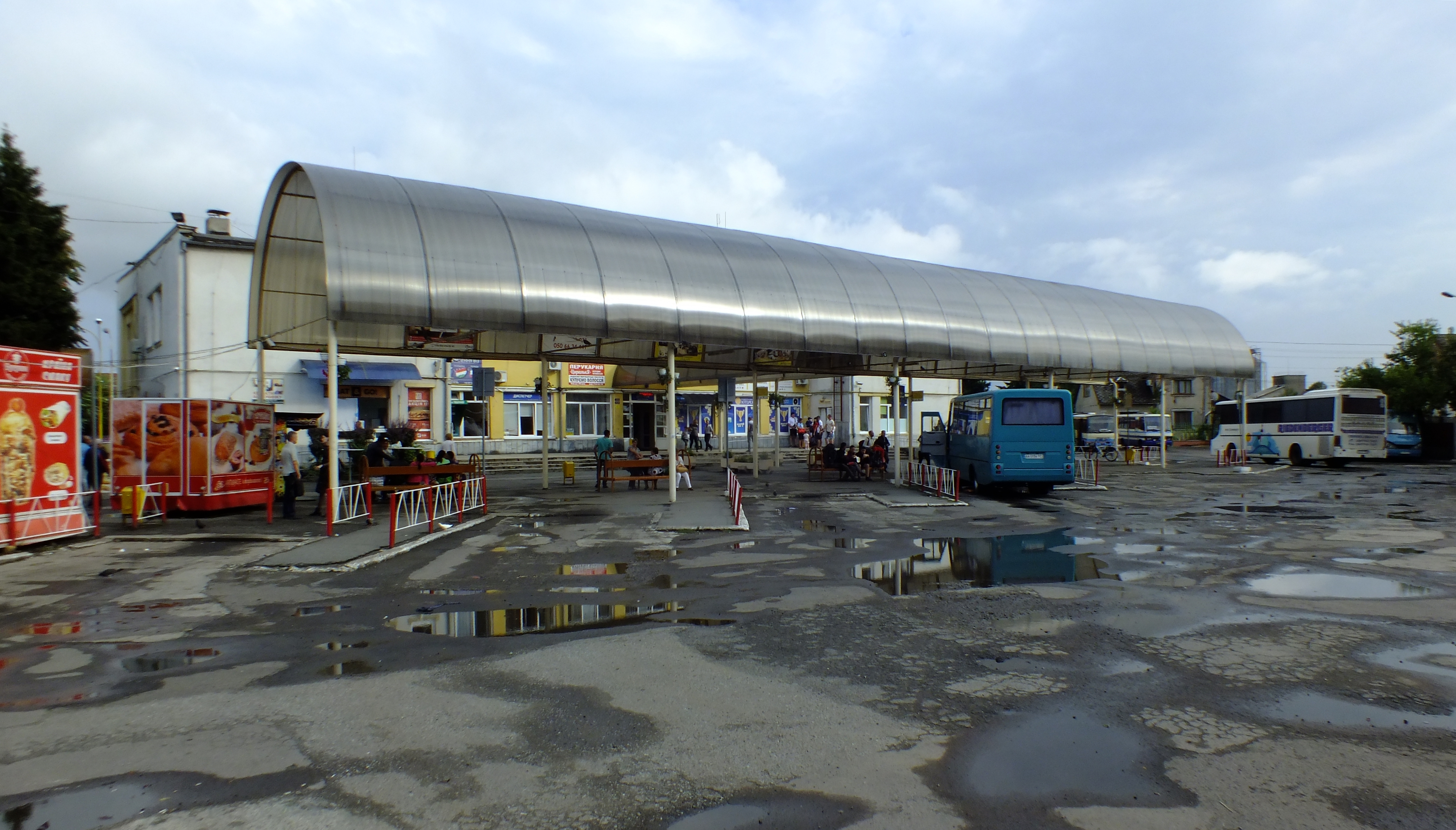 Autobusové nádraží ze uvnitř